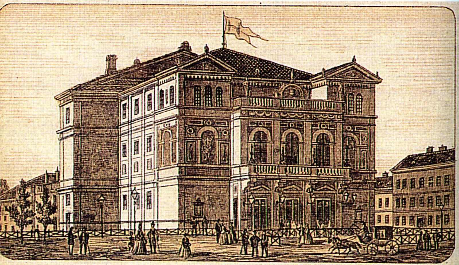 Interimstheater Brno, Fellner und Helmer, 1870 erbaut. Žerotínovo Platz. Zerstört